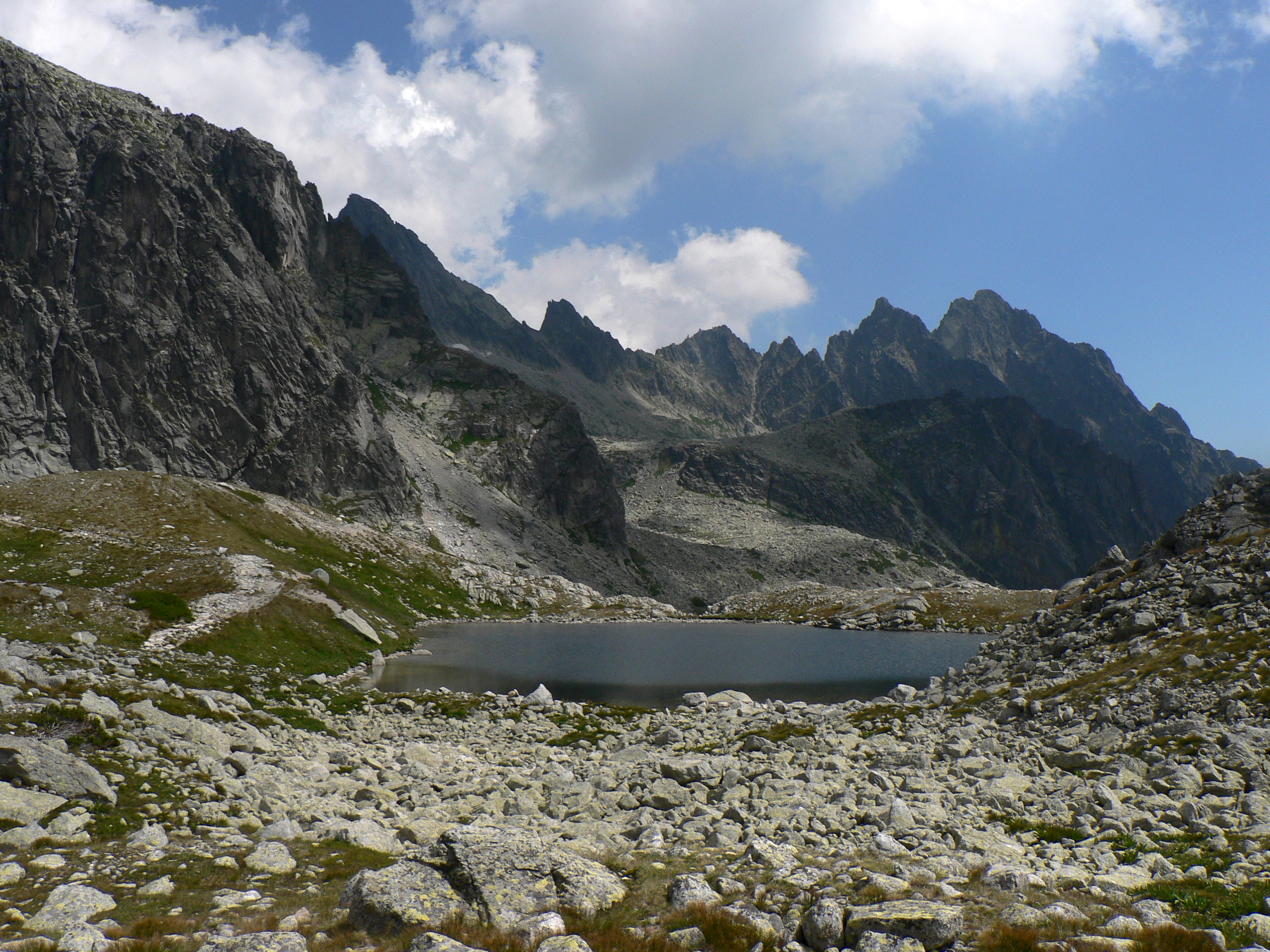 Wyżni Harnaski Staw, ponad nim Spąga, Sokola Turnia, Drobna Turnia, Żółty Szczyt i Pośrednia Grań